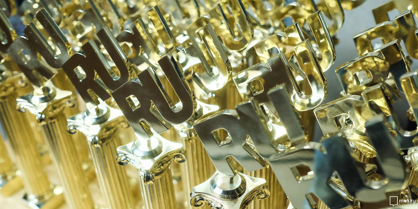 Региональные партнеры портала поставщиков удостоены премии Рунета